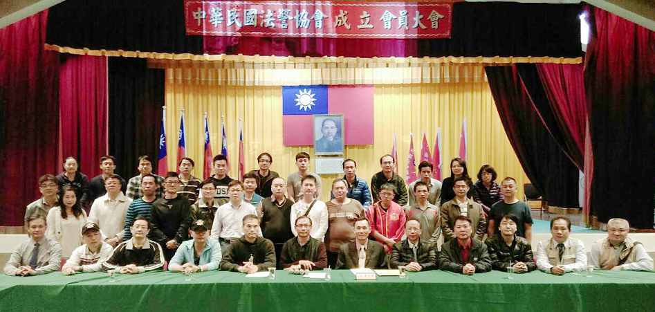 中華民國法警協會成立會員大會，理監事合照。